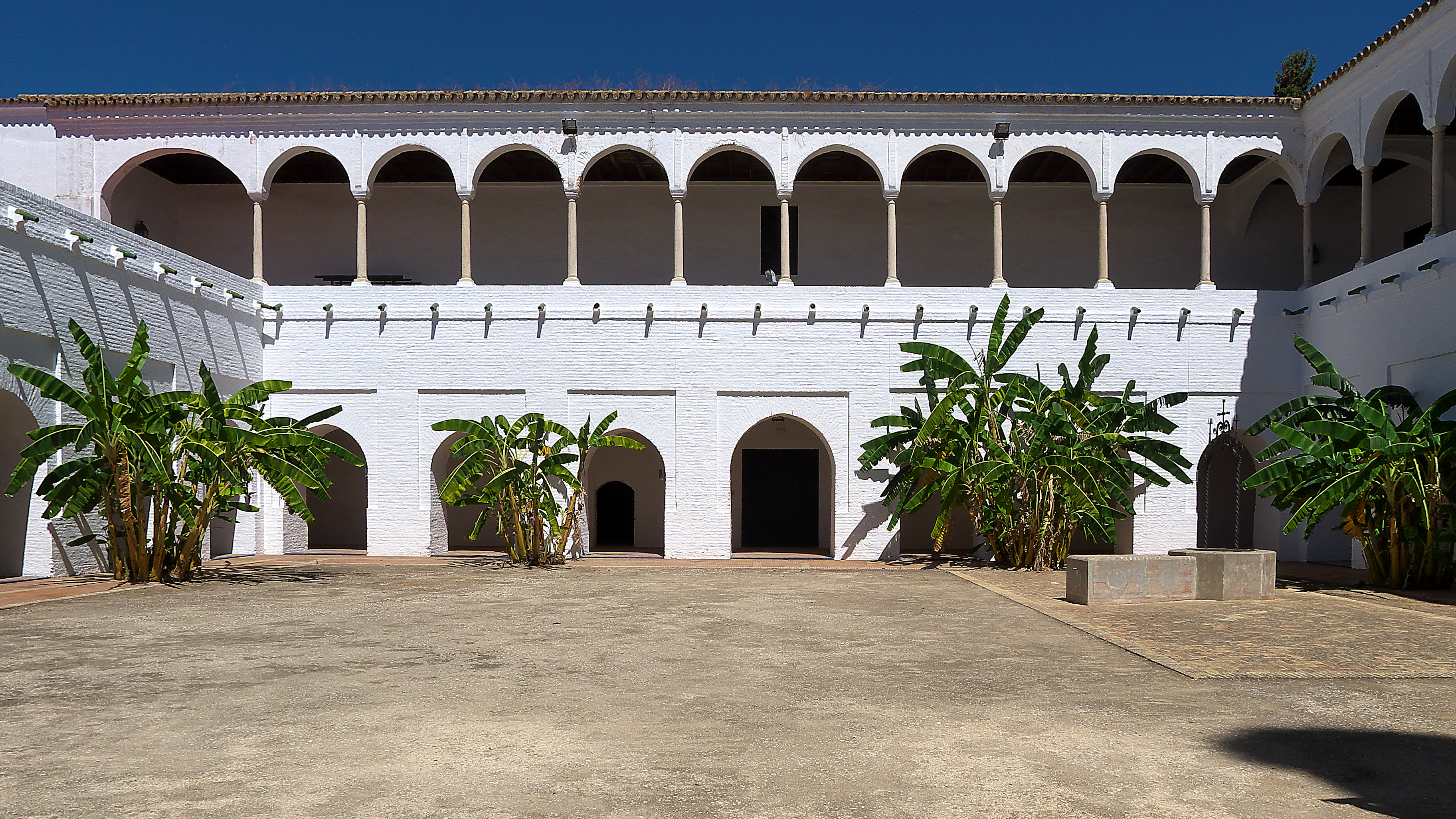 Sus galerías mudéjares, entre las primitivas de la región.